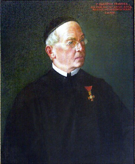 Porträt von Pater Cölestin Stampfer. Nach späterer Nachforschung vermutet der Biograph Reimer im Schlern 3 von 2017, dass dies unsignierte Bild wohl von einem anderen Maler, und zwar Dr. Wibiral, stammt, s. auch